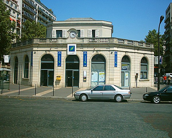 Gare de Pereire-Levallois (Courcelles-Levallois), Paris in summer 2005.